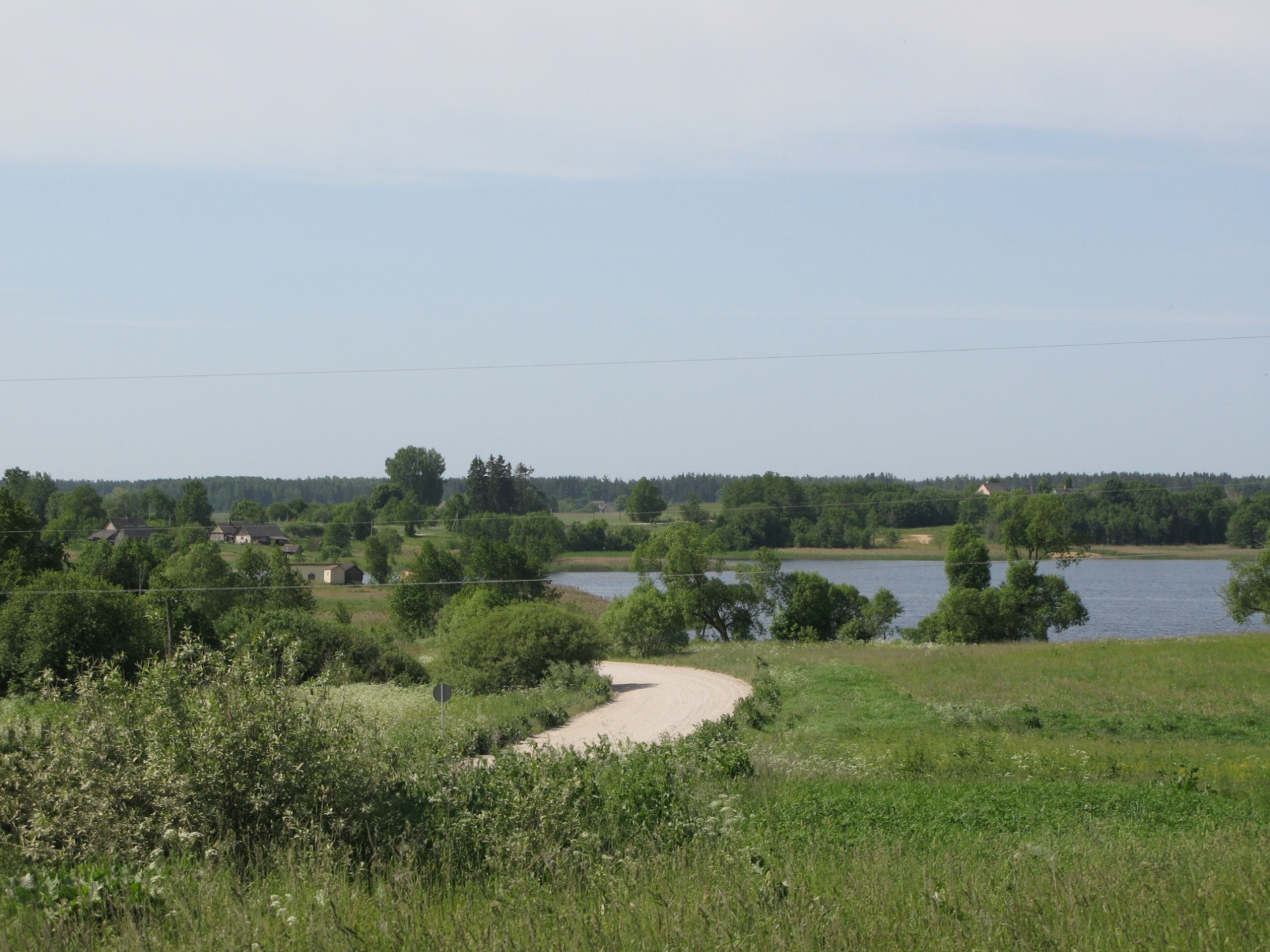 Skats uz Bruņu ezeru.